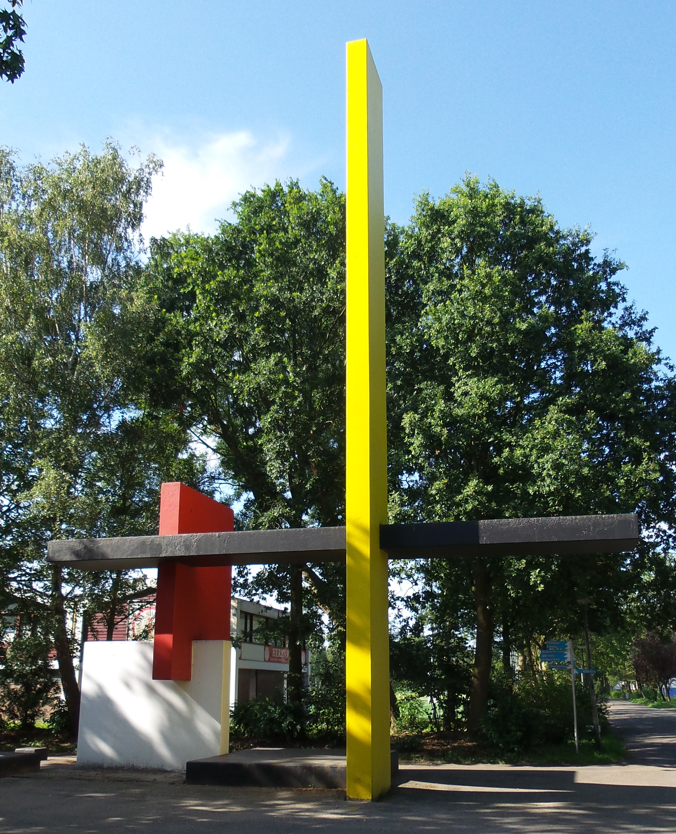 Betonplastiek van de Belgische schilder Joseph Ongenae uit 1973 op het sportpark Sloten aan de Sloterweg in Amsterdam Nieuw West.